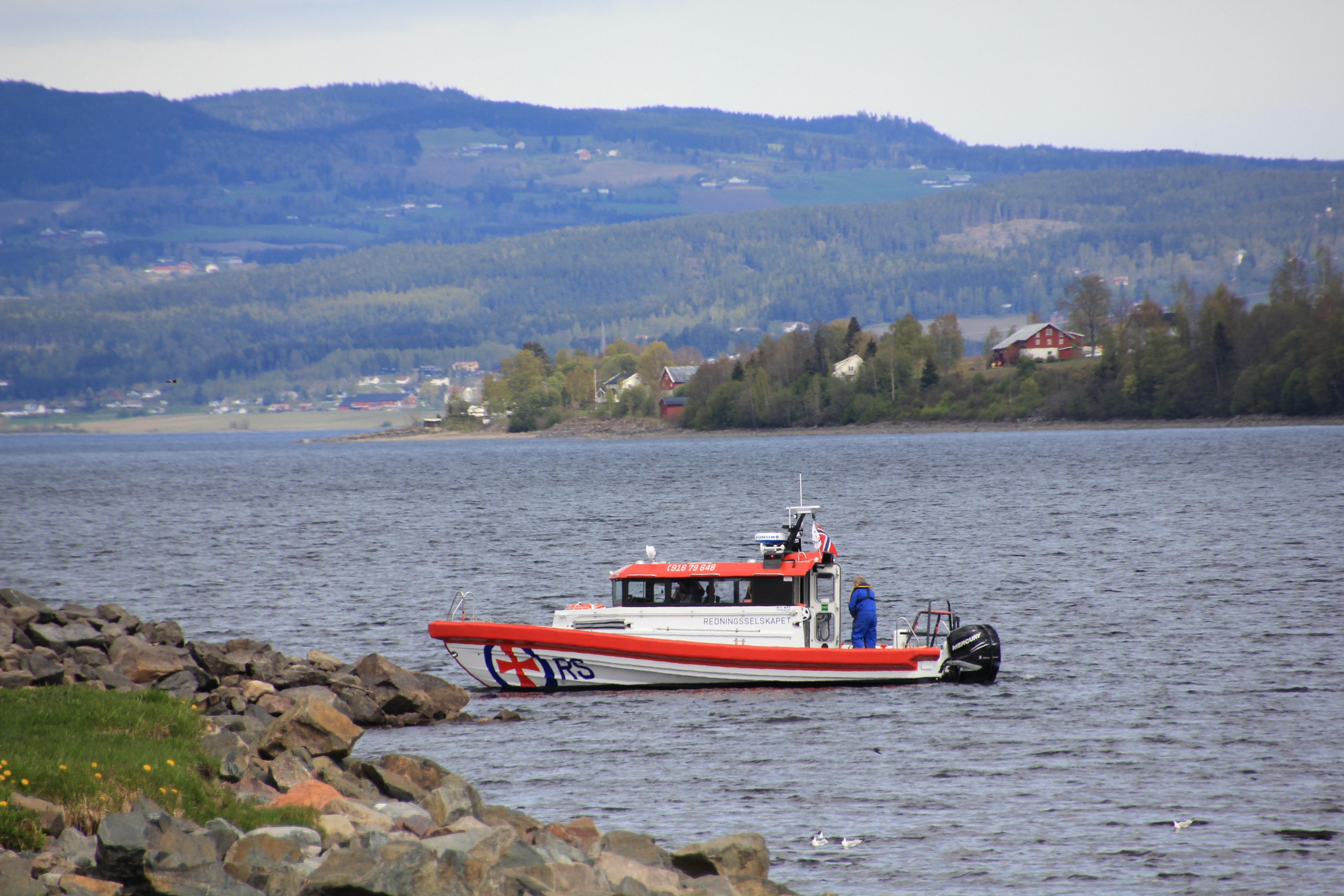 Redningsskøyta på Mjøsa.